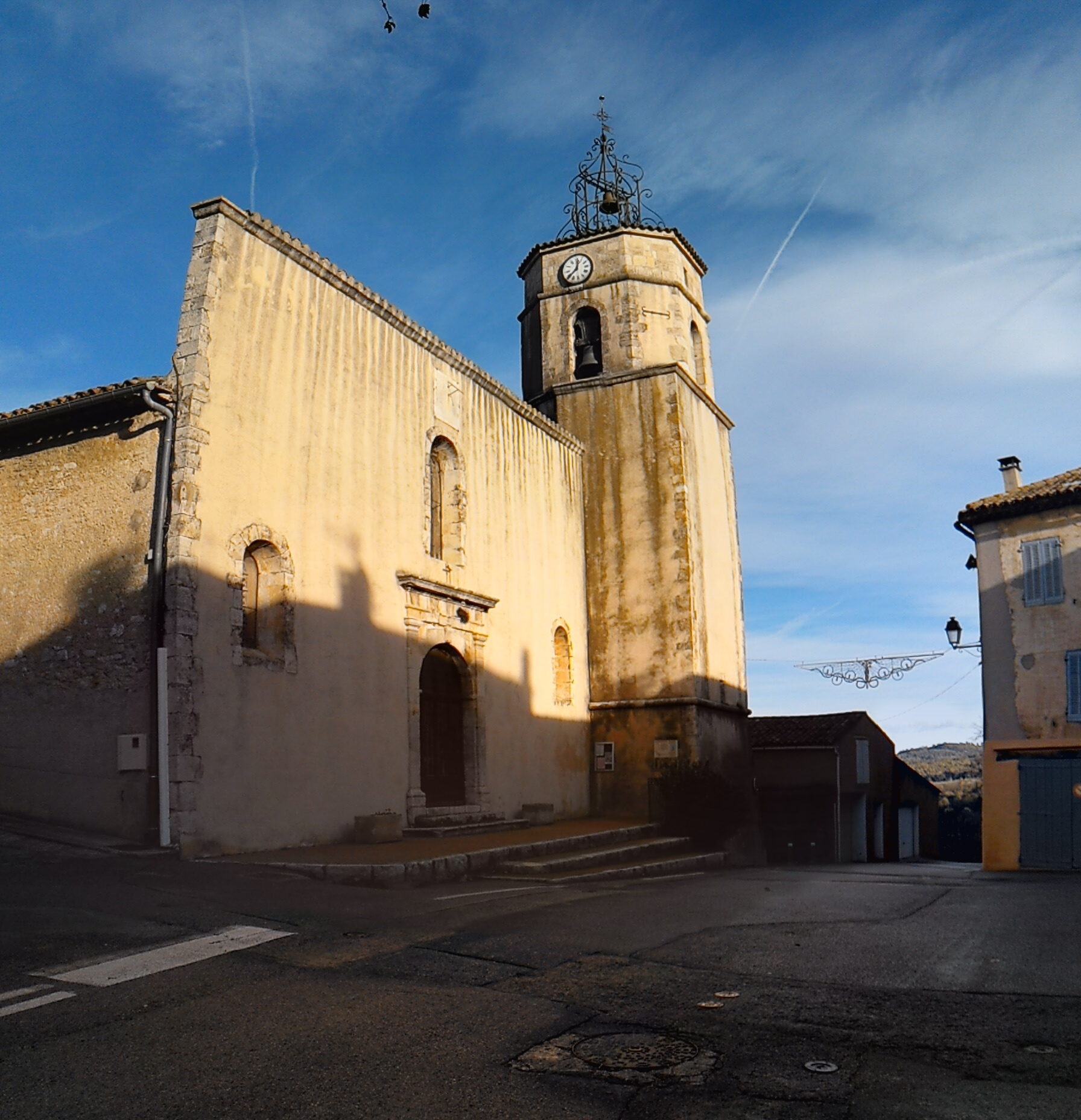 83670 Pontevès, Saints-Gervais-et-Protais.